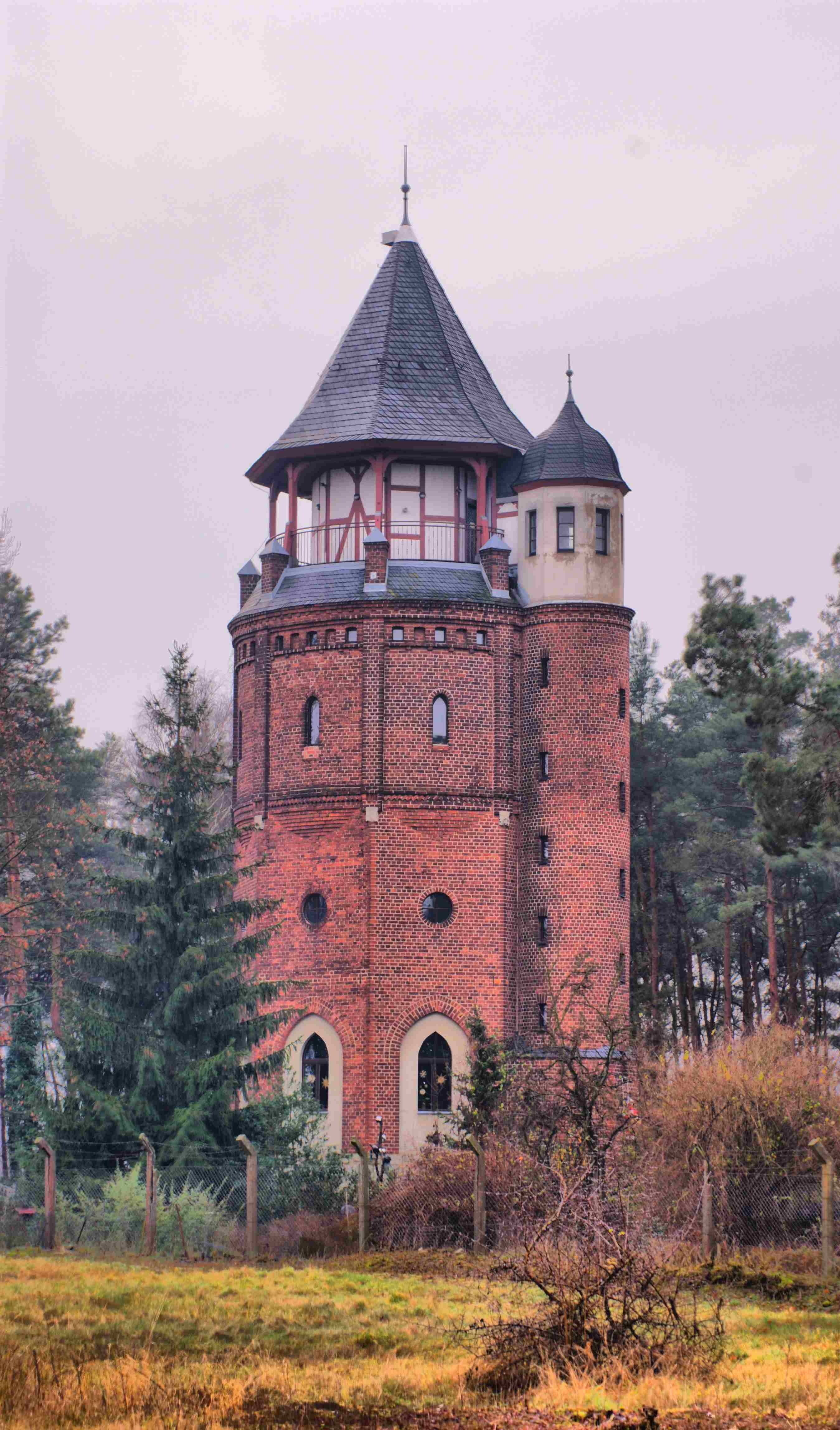 "Der Turm" ehemaliger Wasserturm in Königs Wusterhausen (HDR)